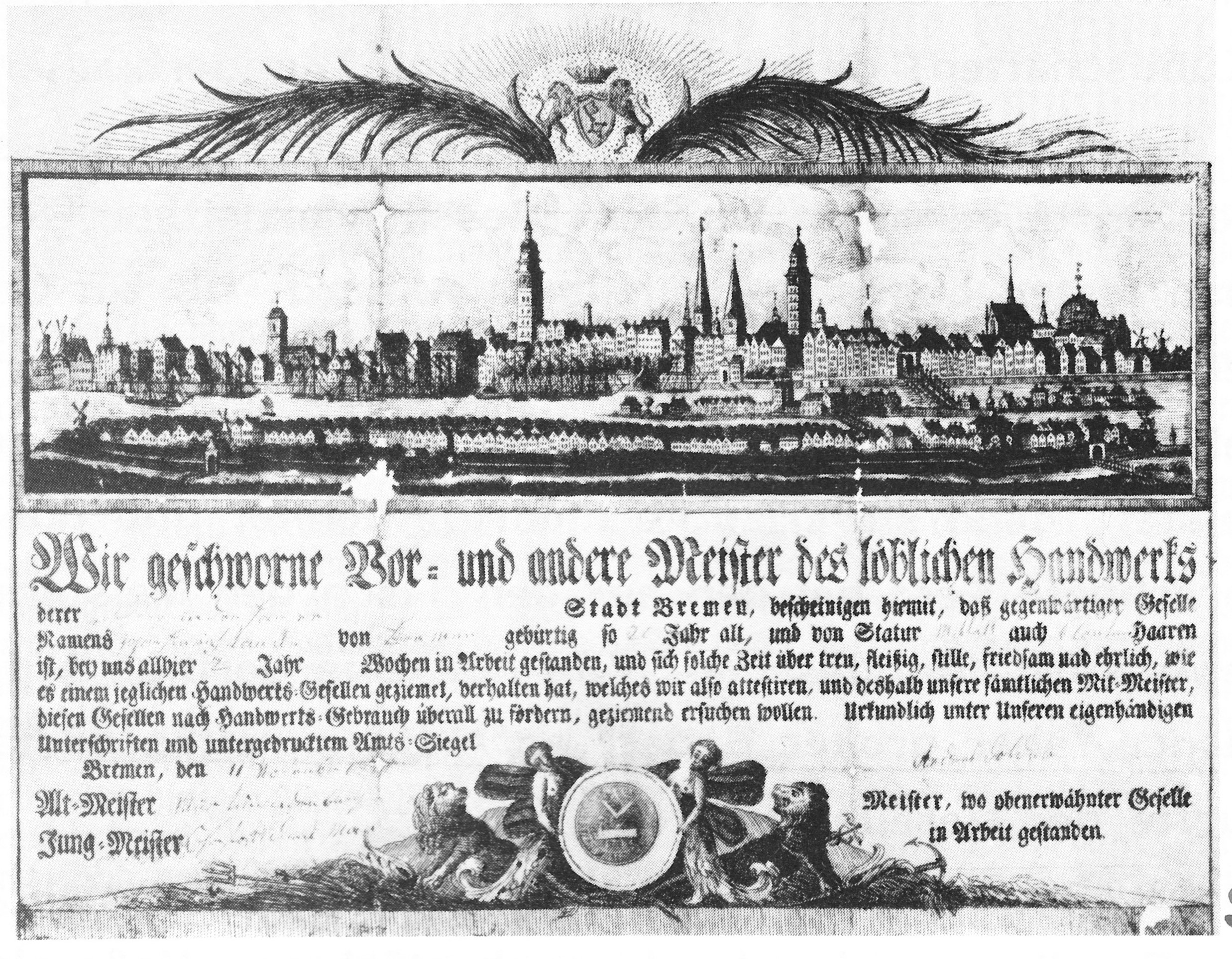 Kundschaft, copperplate, Bremen (Germany) 1818